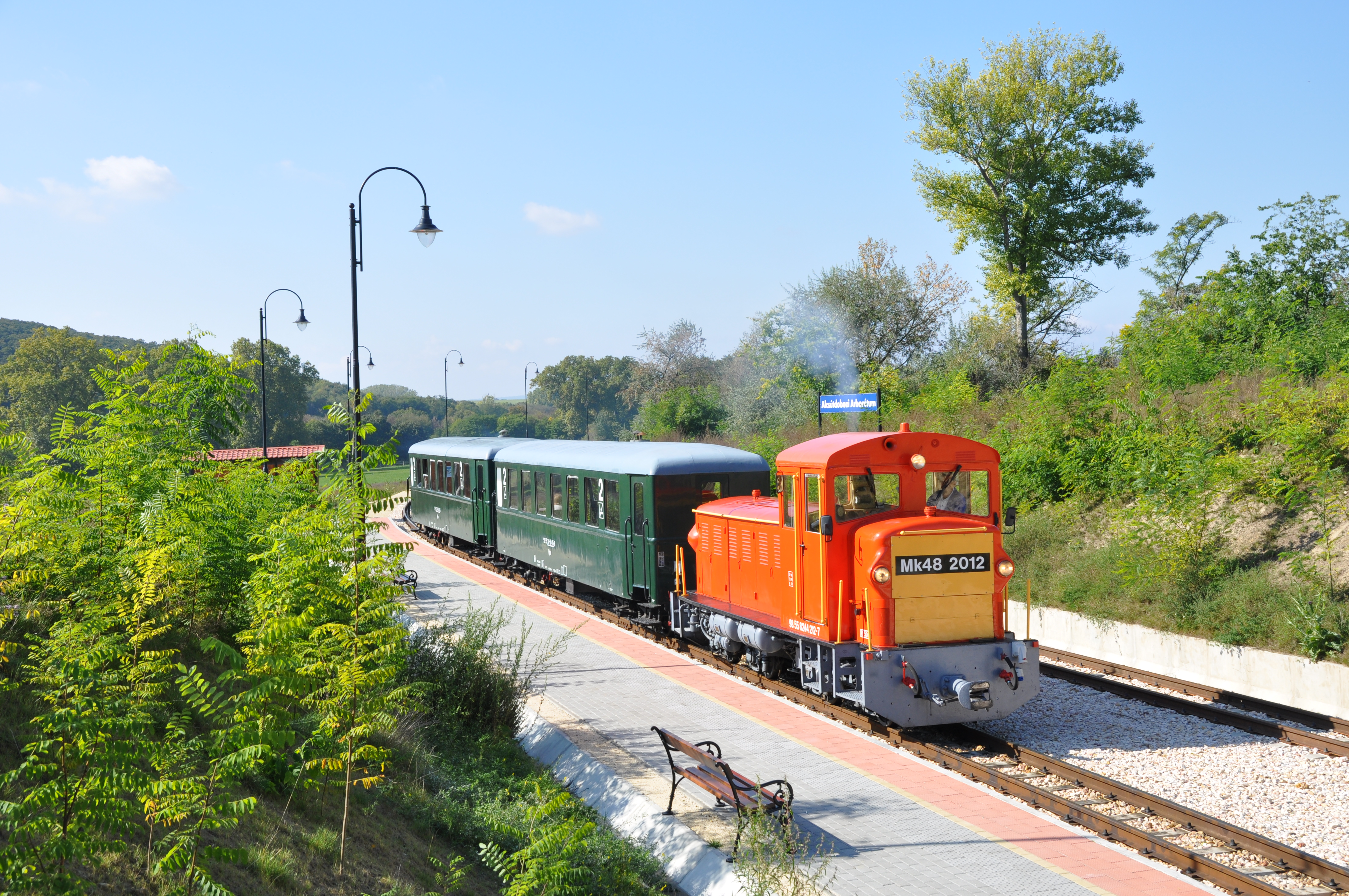 Felcsút, Vál-völgyi Kisvasút, Alcsútdoboz Arborétum